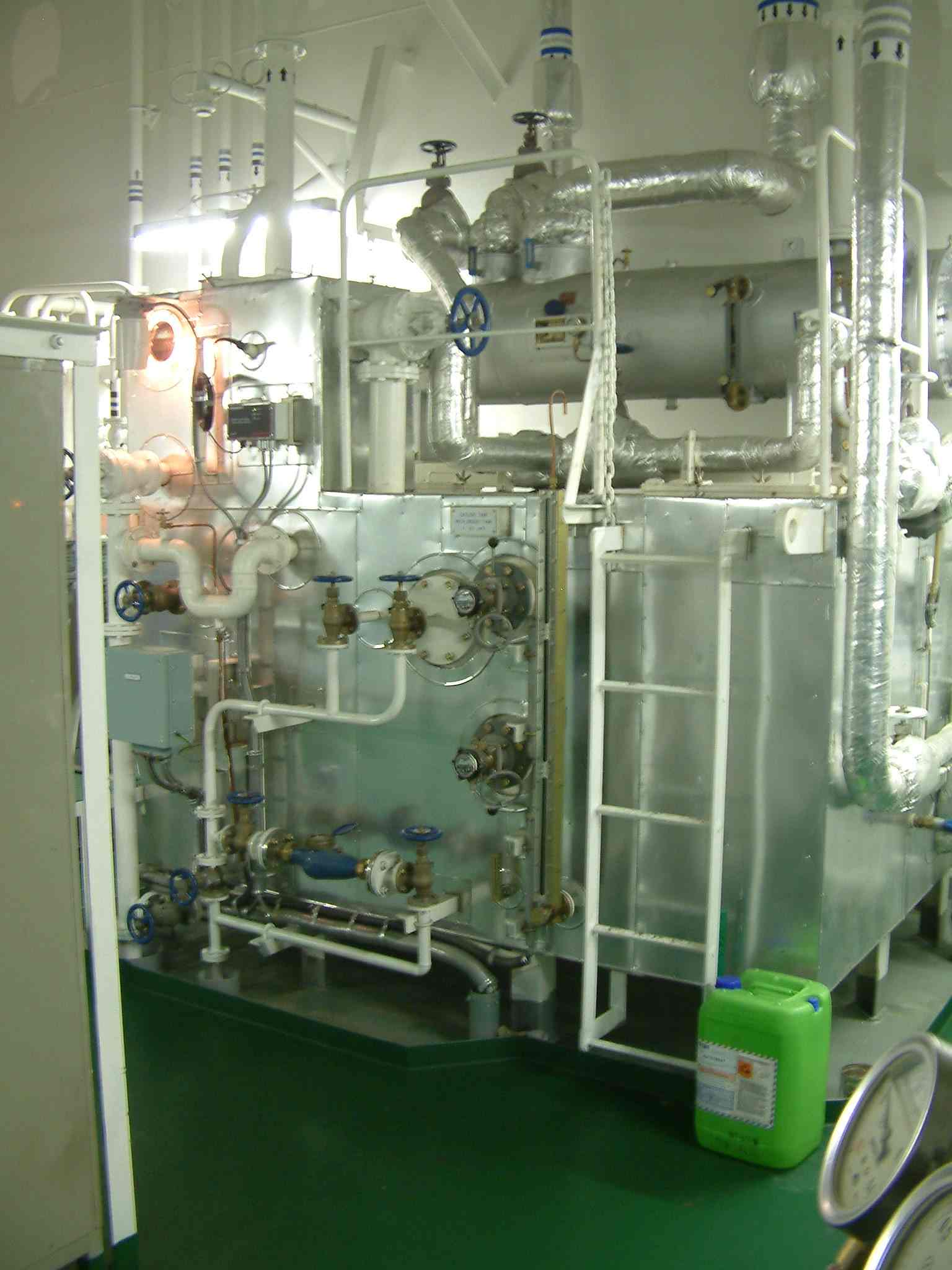 Speisewassertank